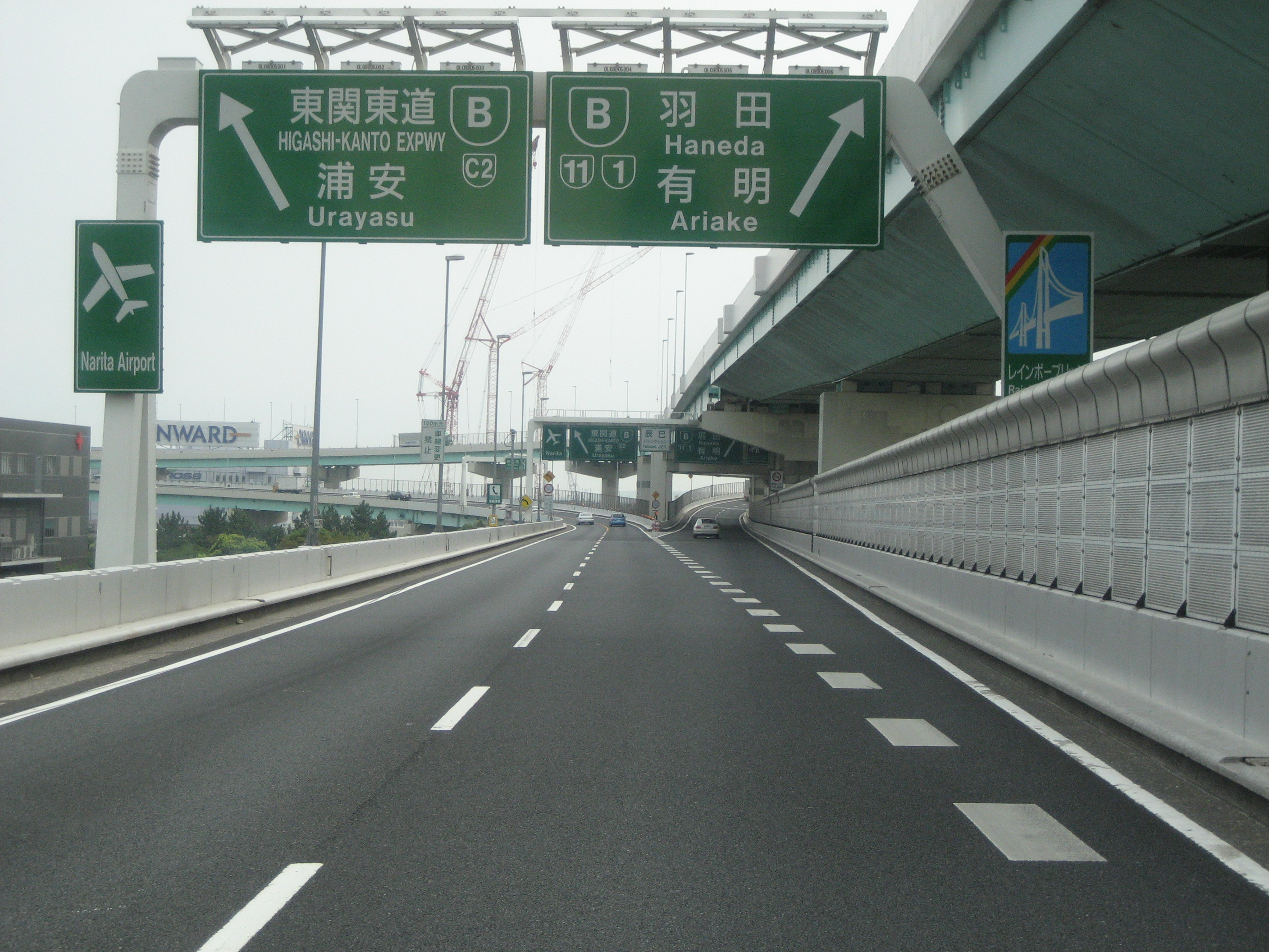 首都高速辰巳JCT